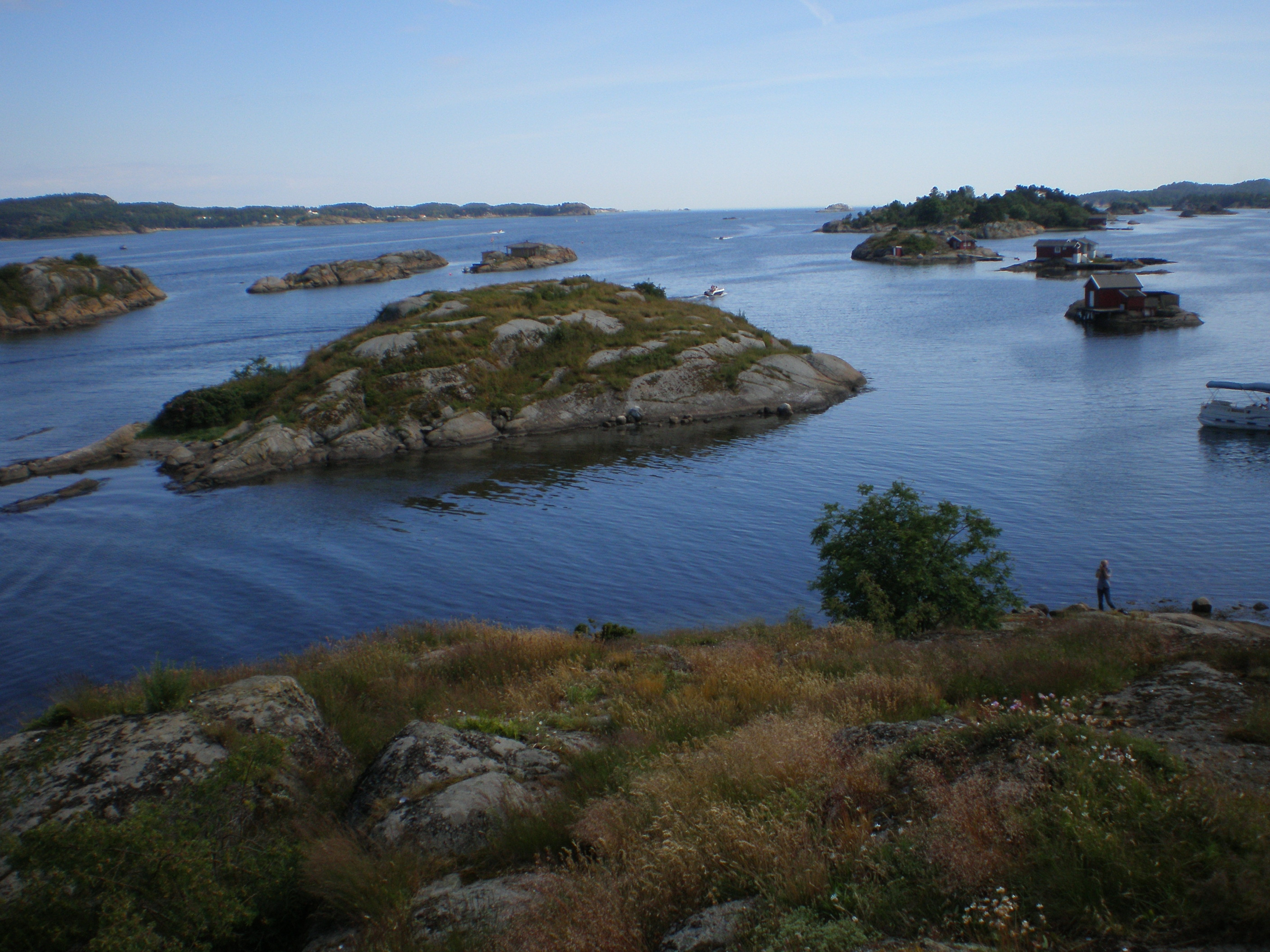 Sandefjord, Norwegia